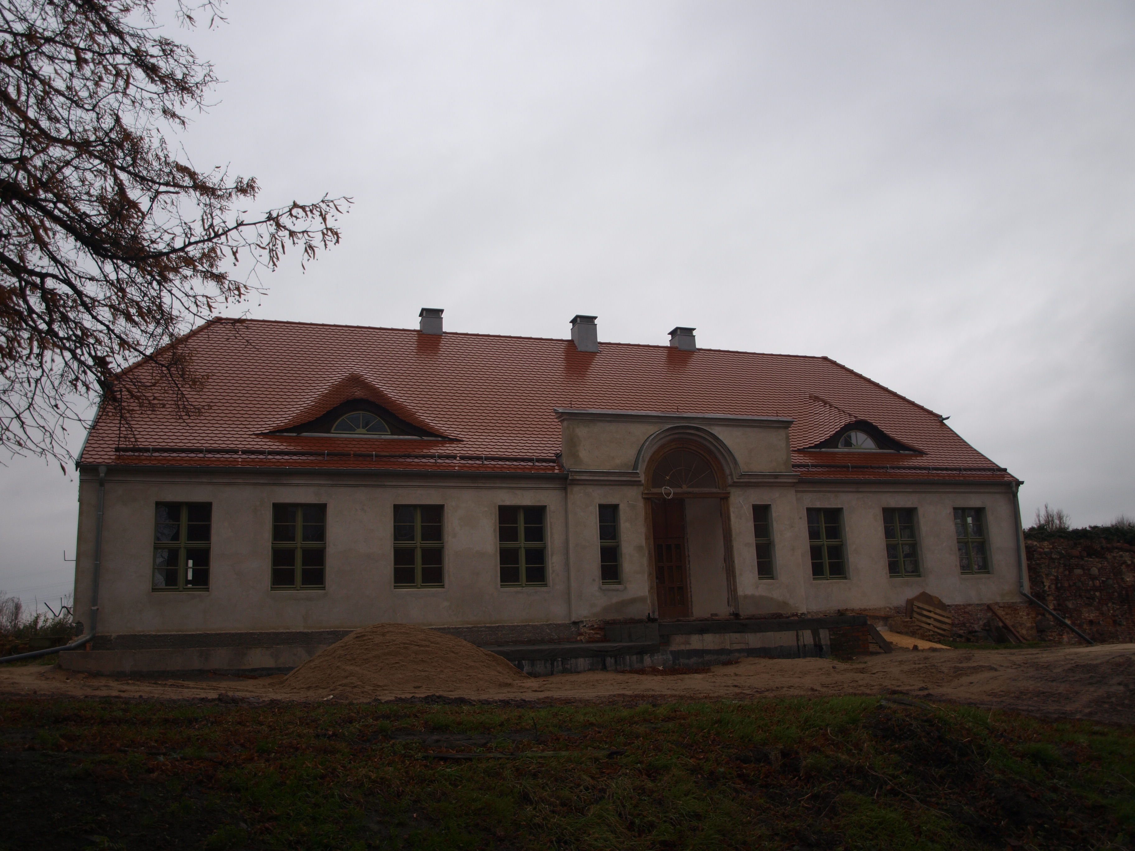 Dwór w Wolinie w 2011 roku